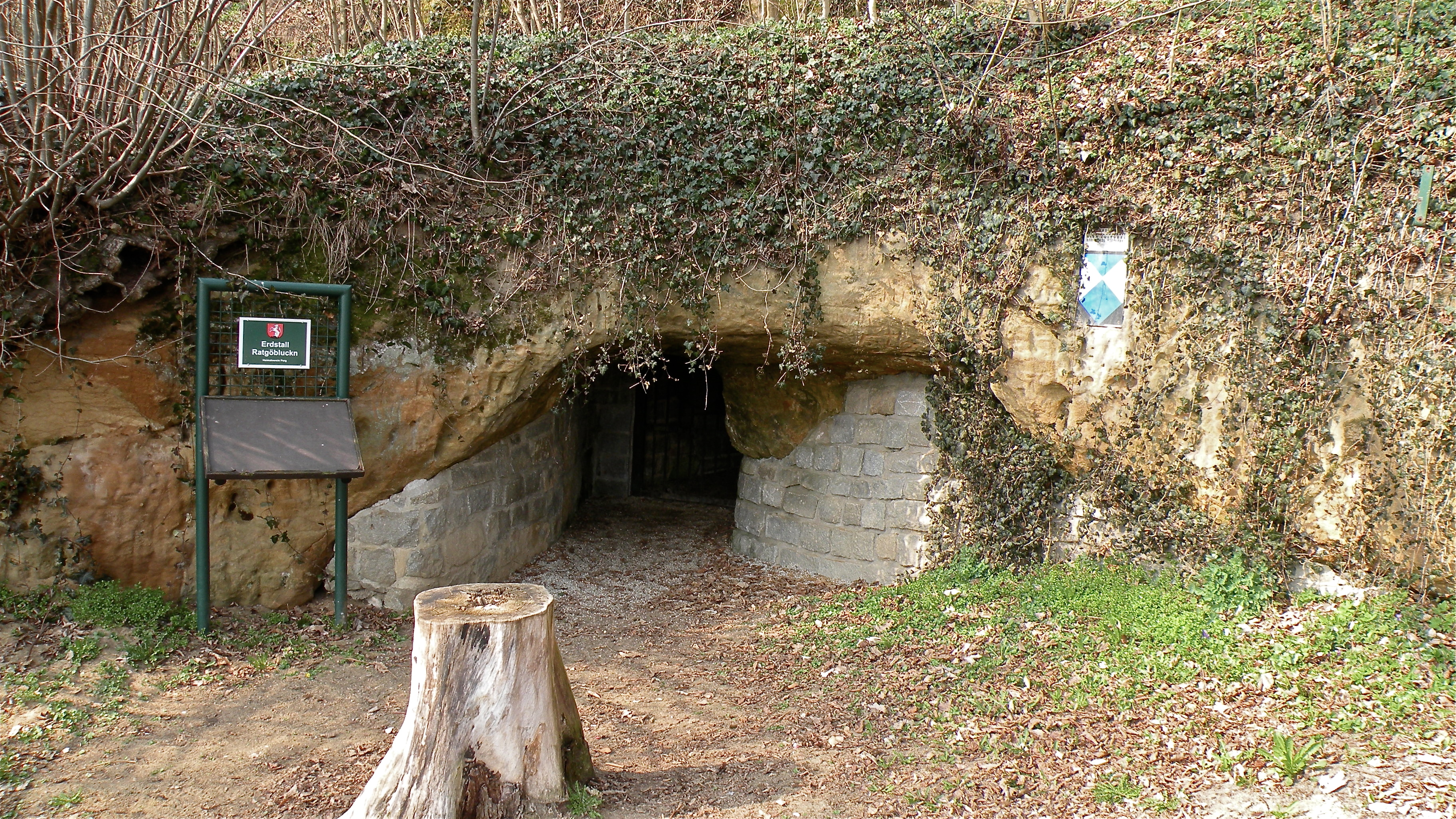 Mühlsteinbruch Scherer, Steinbrecherhaus, Erdstall